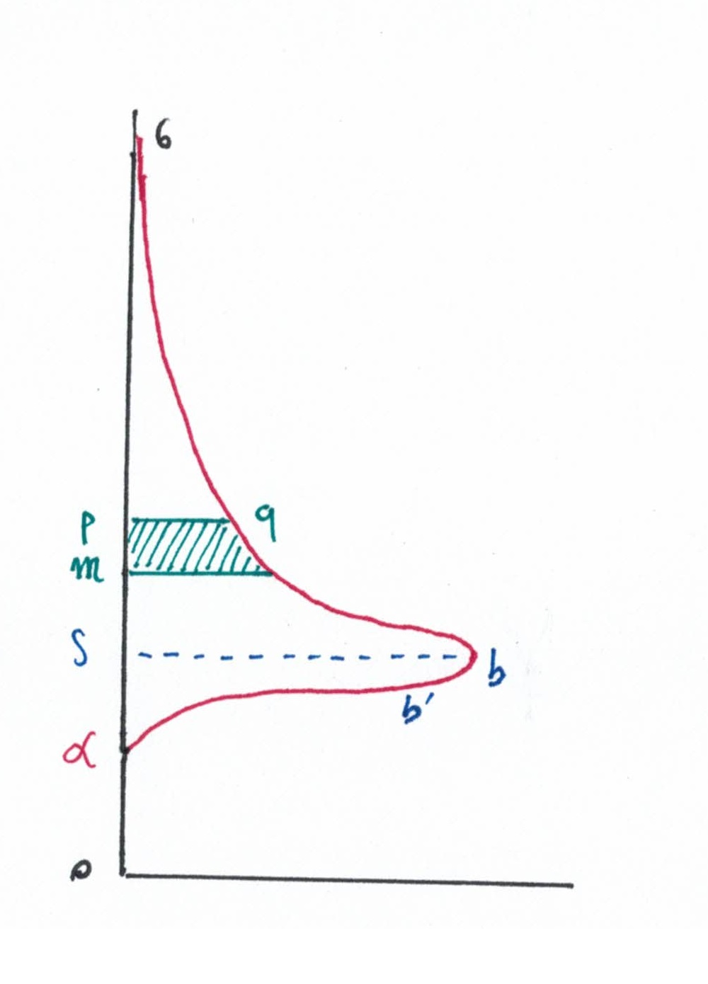 Quels que soient la société humaine, l'époque ou le pays, Pareto observe un diagramme de distribution des richesses en forme de flèche (l'échelle verticale explore les revenus croissants et l'échelle horizontale la population). Le nombre de personnes ayant un revenu compris entre les niveaux m et p est représenté dans la zone en vert. Source complémentaire : Une approche fractale des marchés : risquer, perdre et gagner, Benoît Mandelbrot et Richard L. Hudson, éd. Odile Jacob, 2005 (ISBN 2738115365), p.174